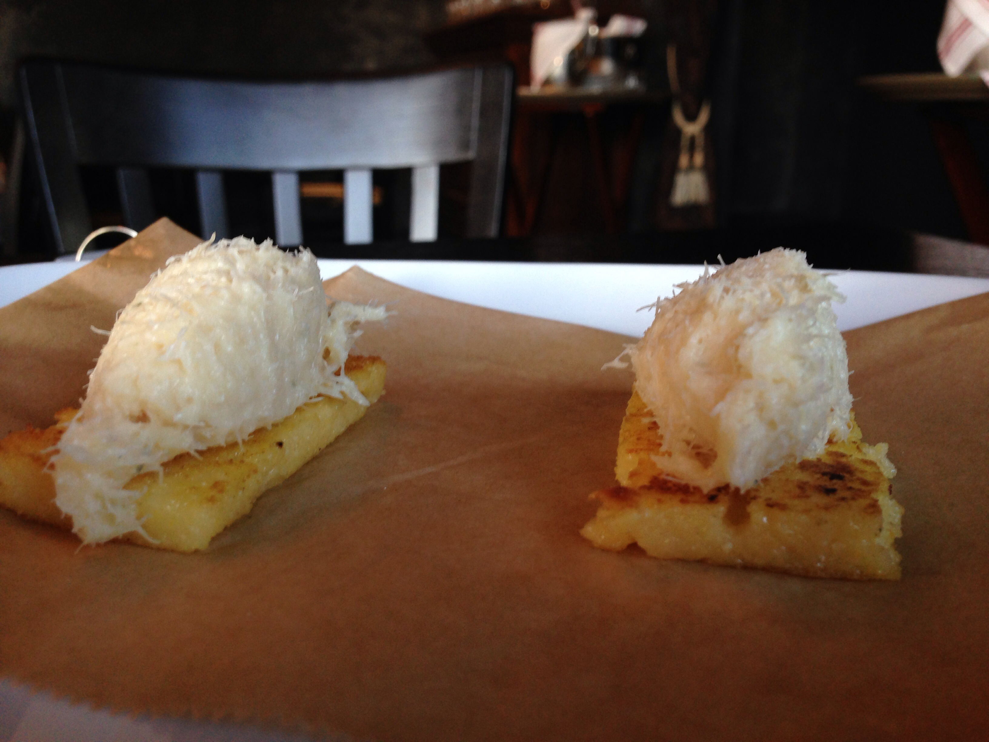 cicchetti veneziani con polenta fritta e baccalà mantecato